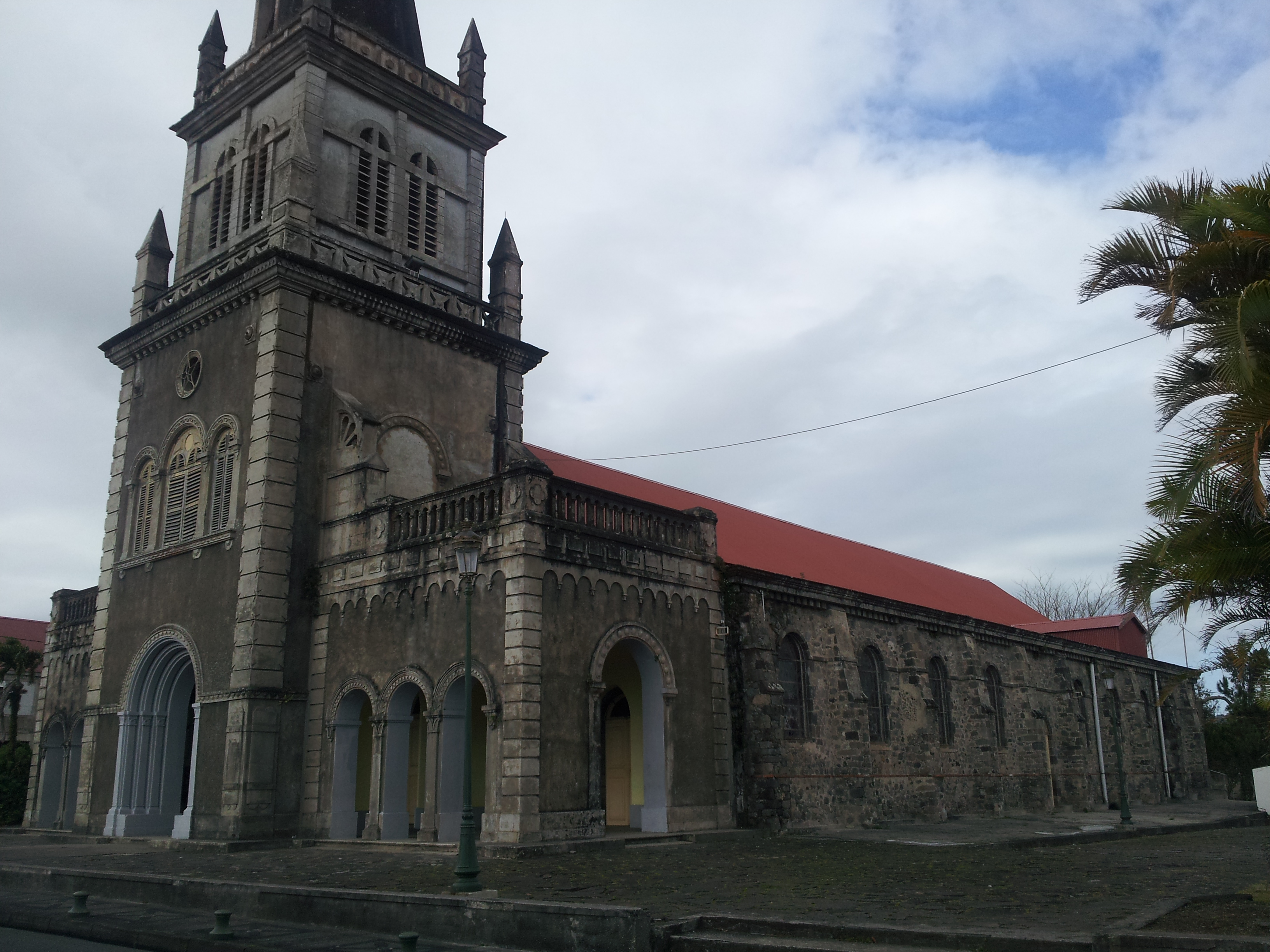 Côté de l'église Notre-Dame de la Délivrande du Morne-Rouge